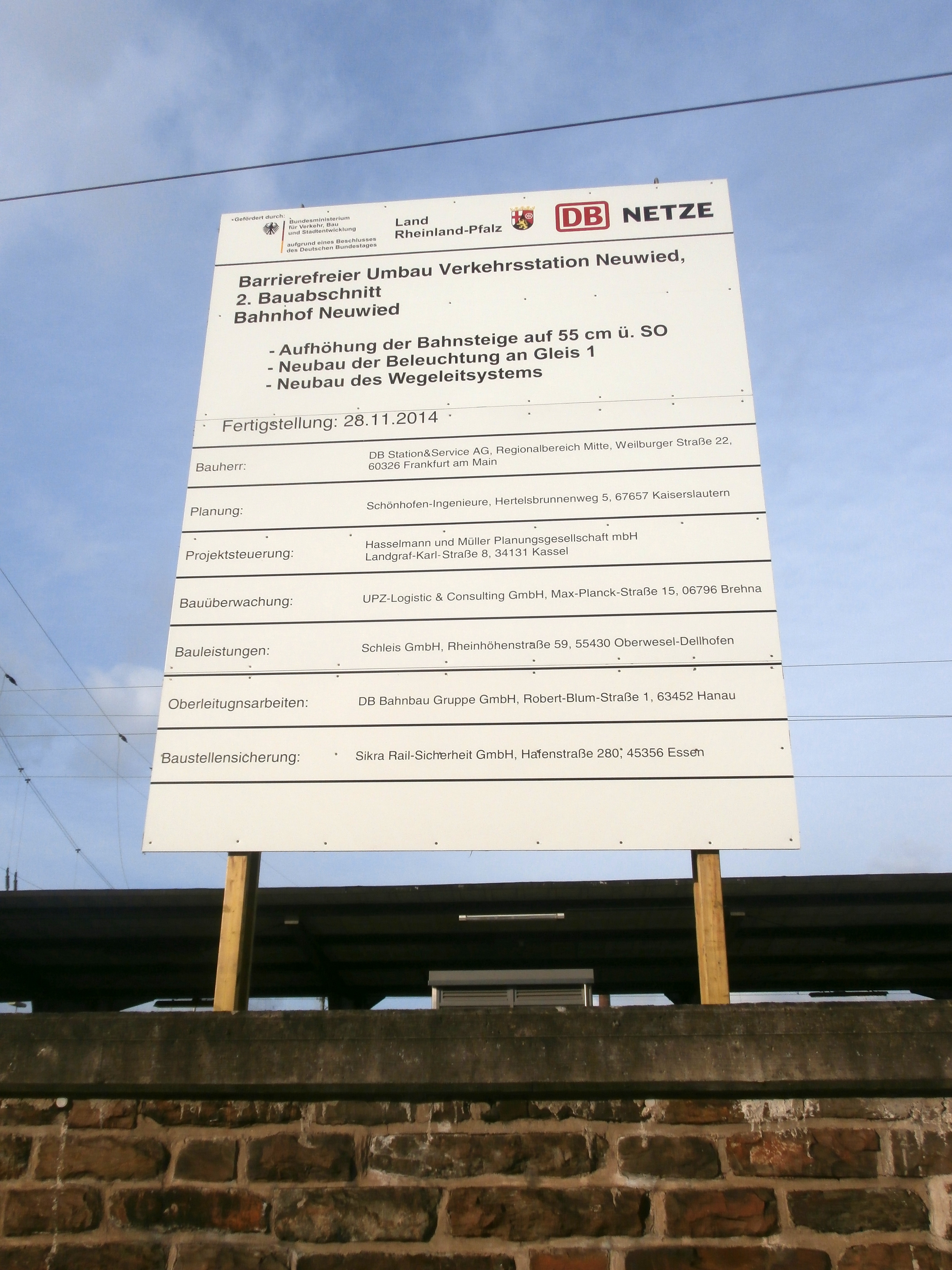 2. Bauabschnitt der Modernisierung des Bahnhofs Neuwied, Bauschild